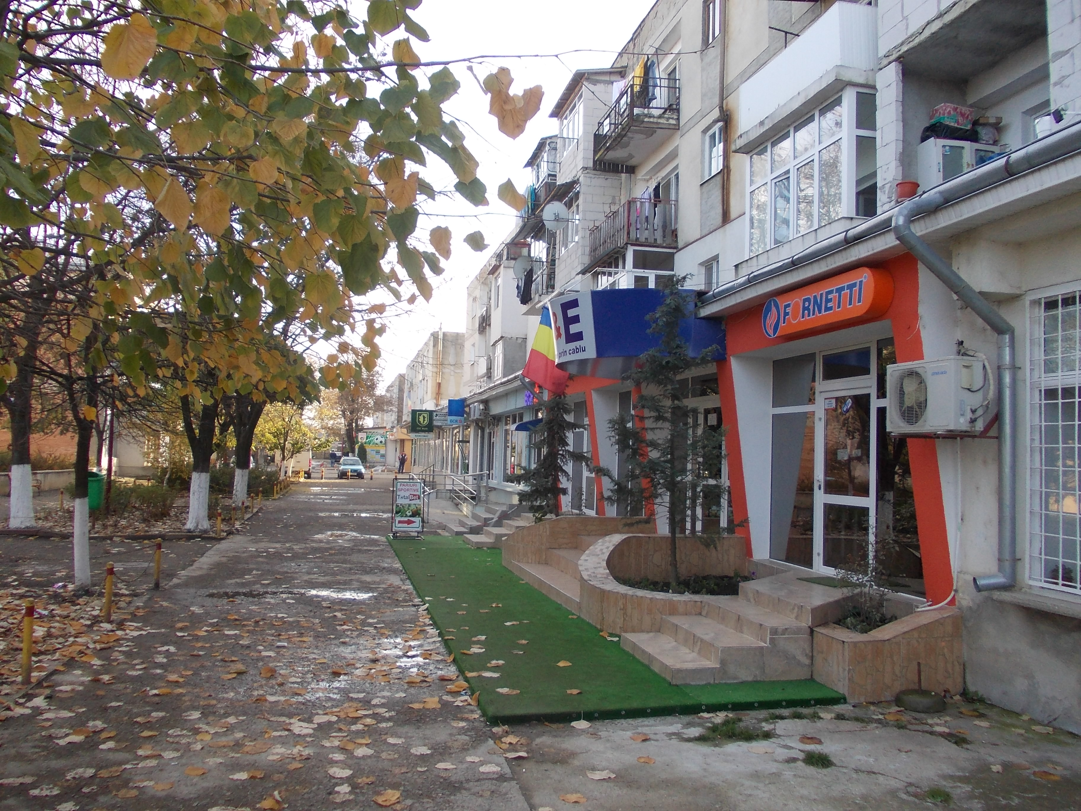 stradă centrală Flămânzi